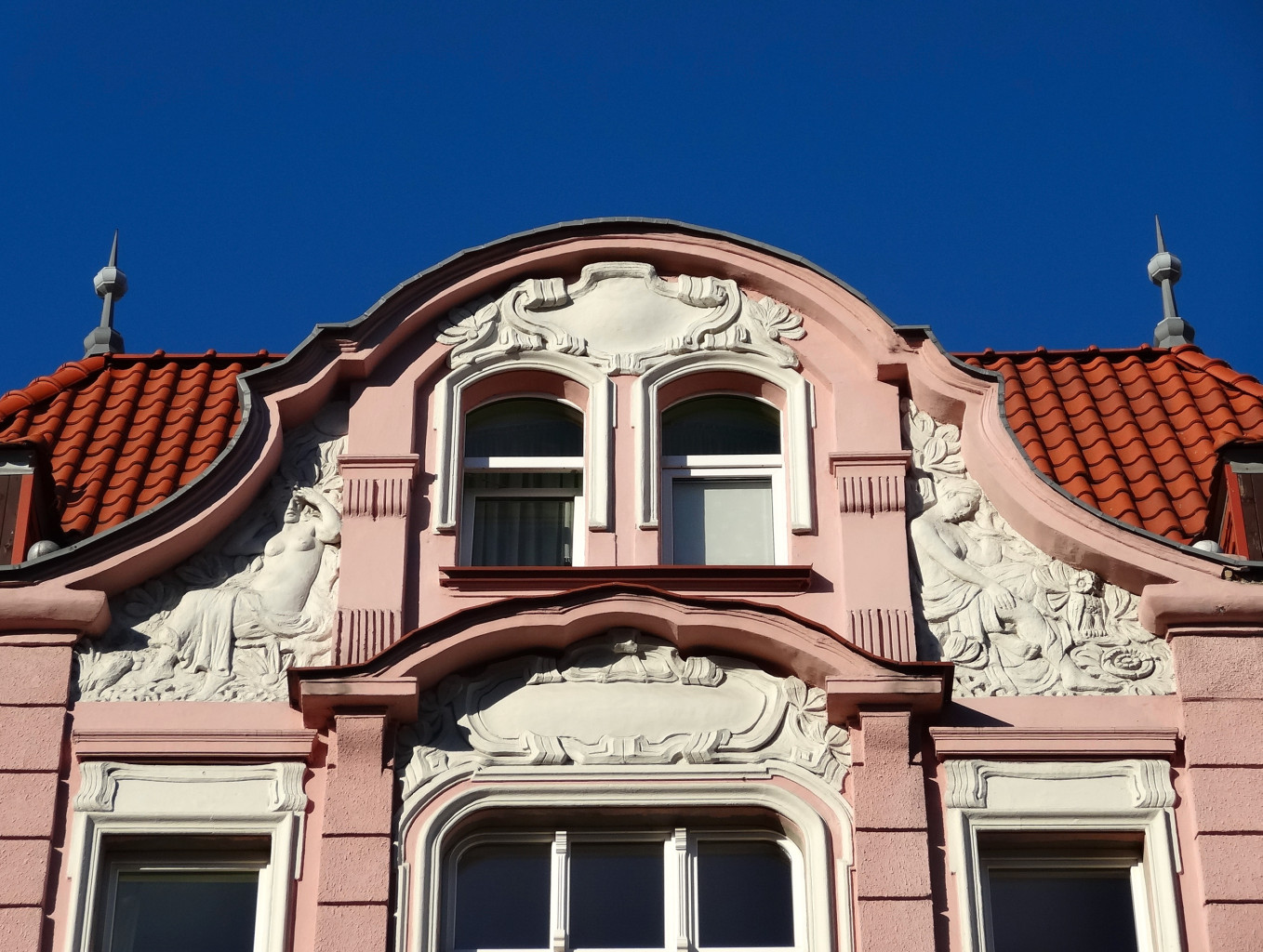 Kamienica przy ul. Cieszkowskiego 9 w Bydgoszczy (1900-1902, Karl Bergner)